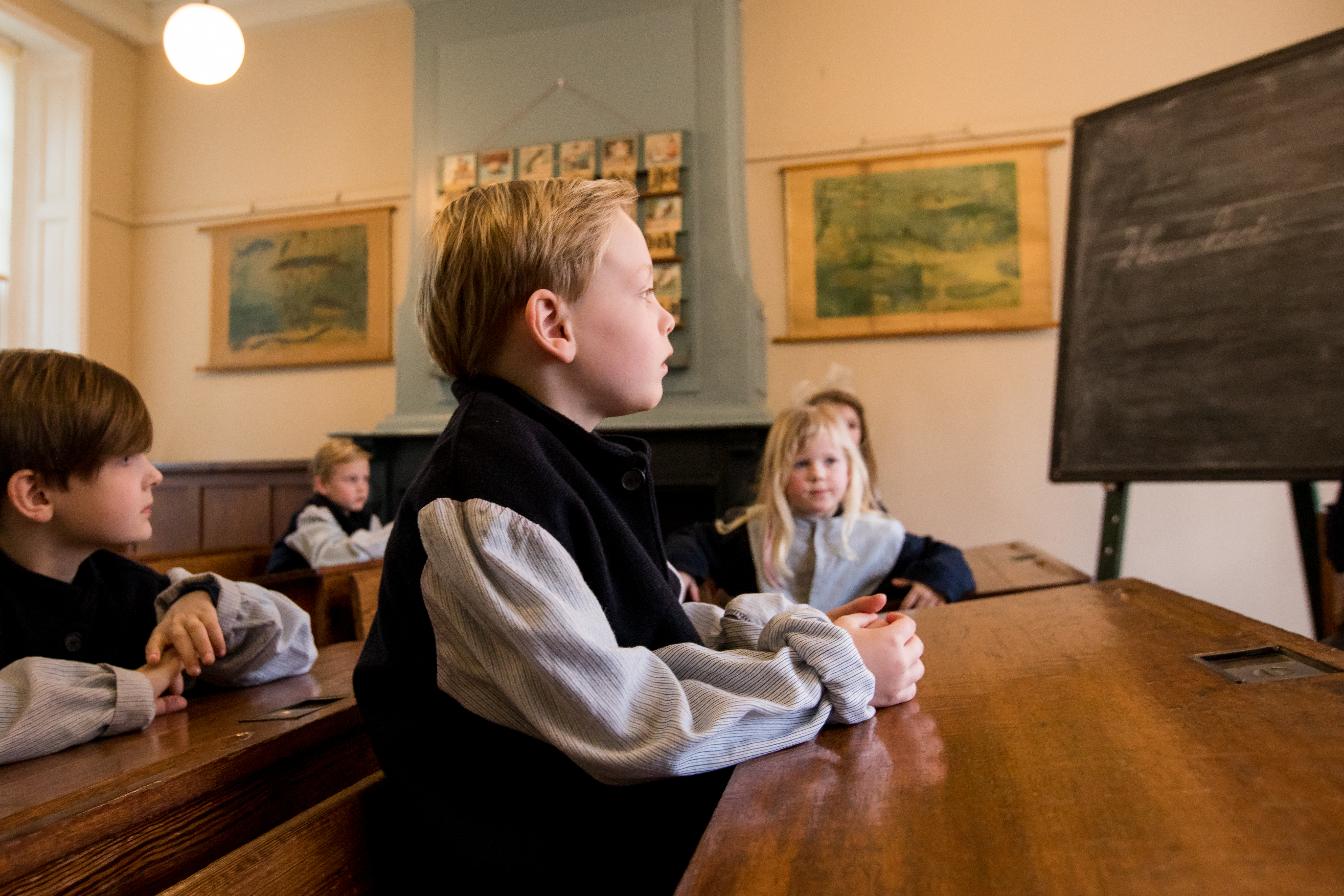 In het weeshuisschooltje kun je leren schrijven met griffel en lei.